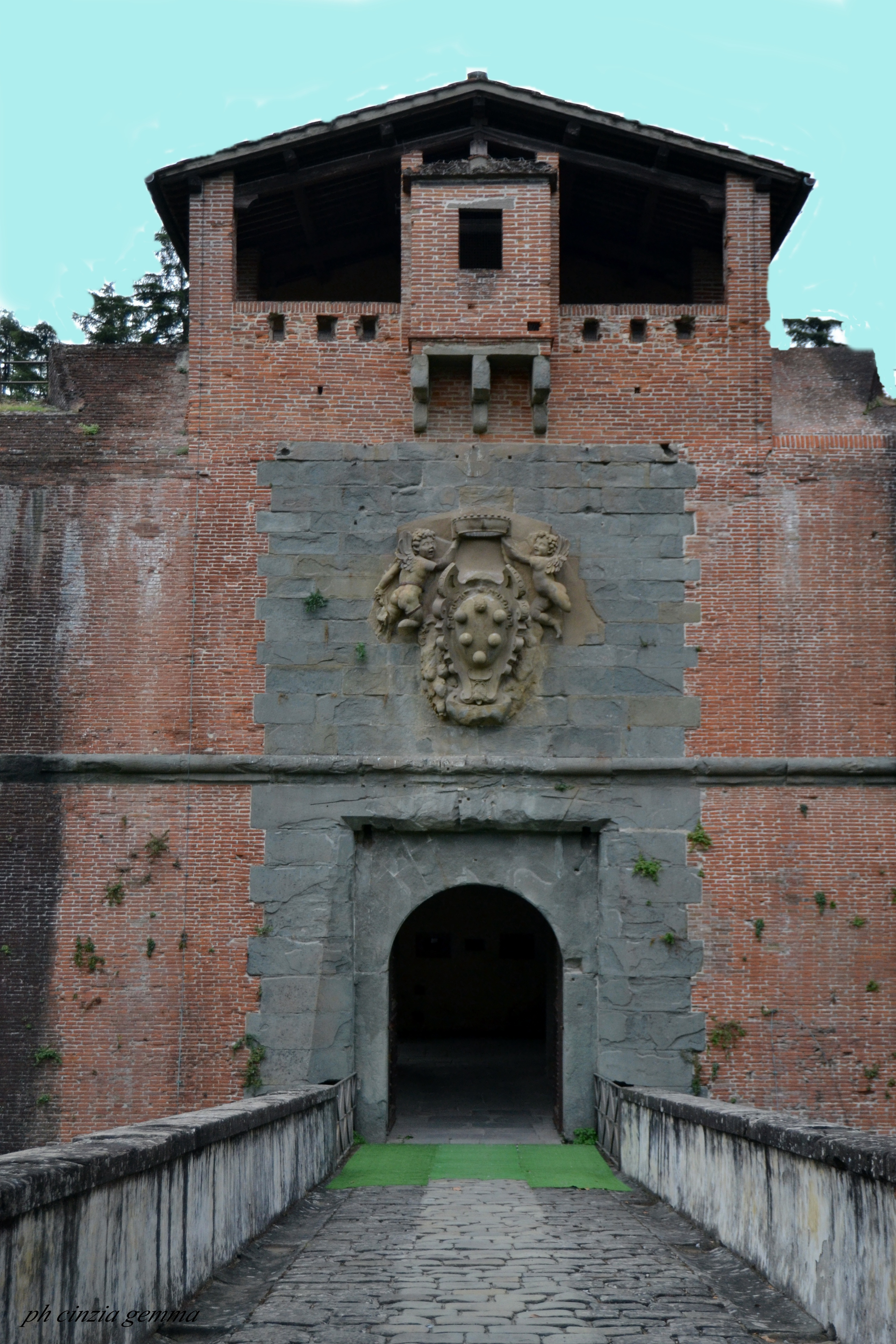 fortezza santa barbara - pistoia This is a photo of a monument which is part of cultural heritage of Italy.